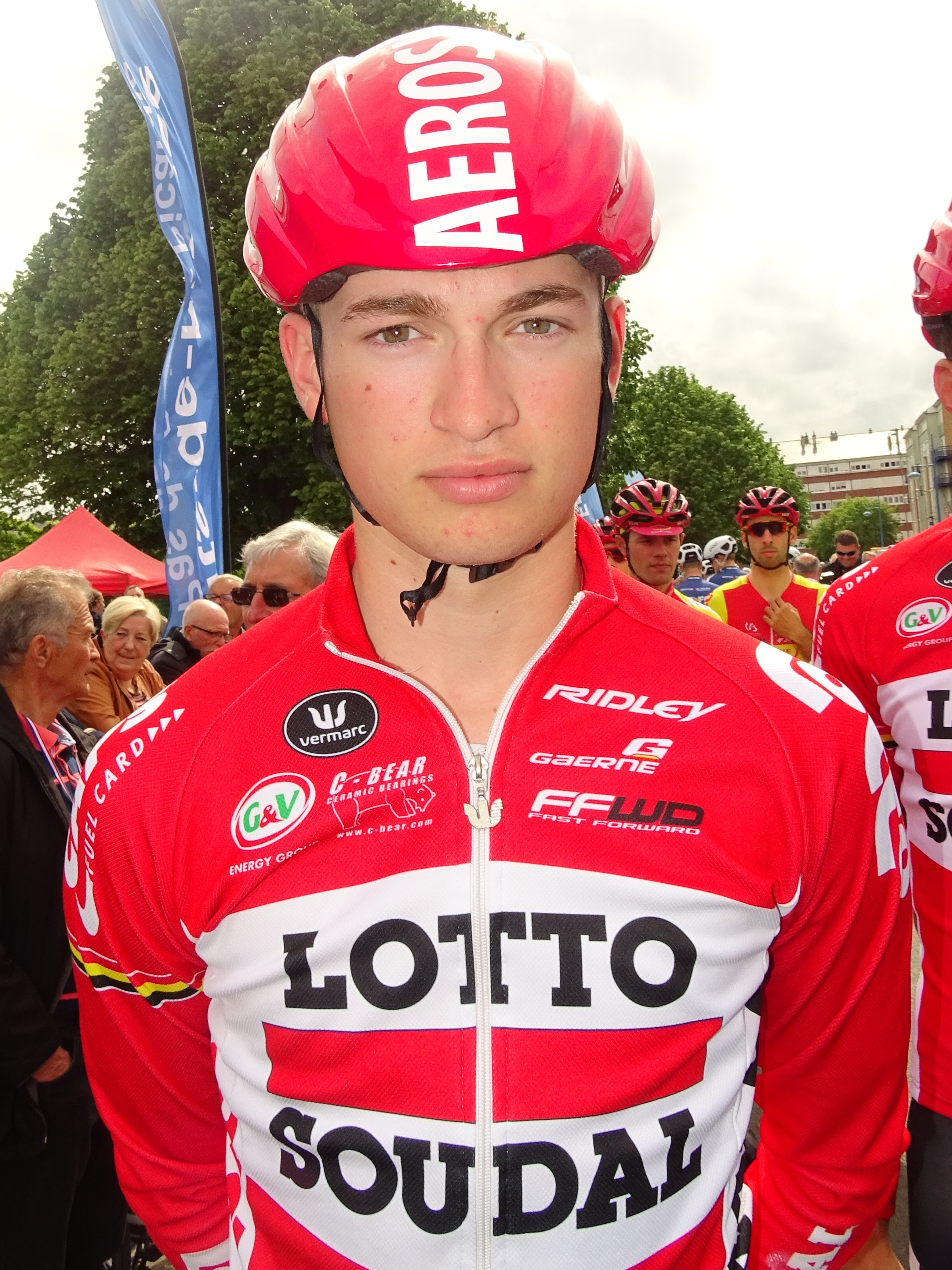 Reportage réalisé le vendredi 20 mai 2016 à l'occasion du départ de la première étape du Paris-Arras Tour 2016 à Douchy-les-Mines, Nord, Nord-Pas-de-Calais-Picardie, France.